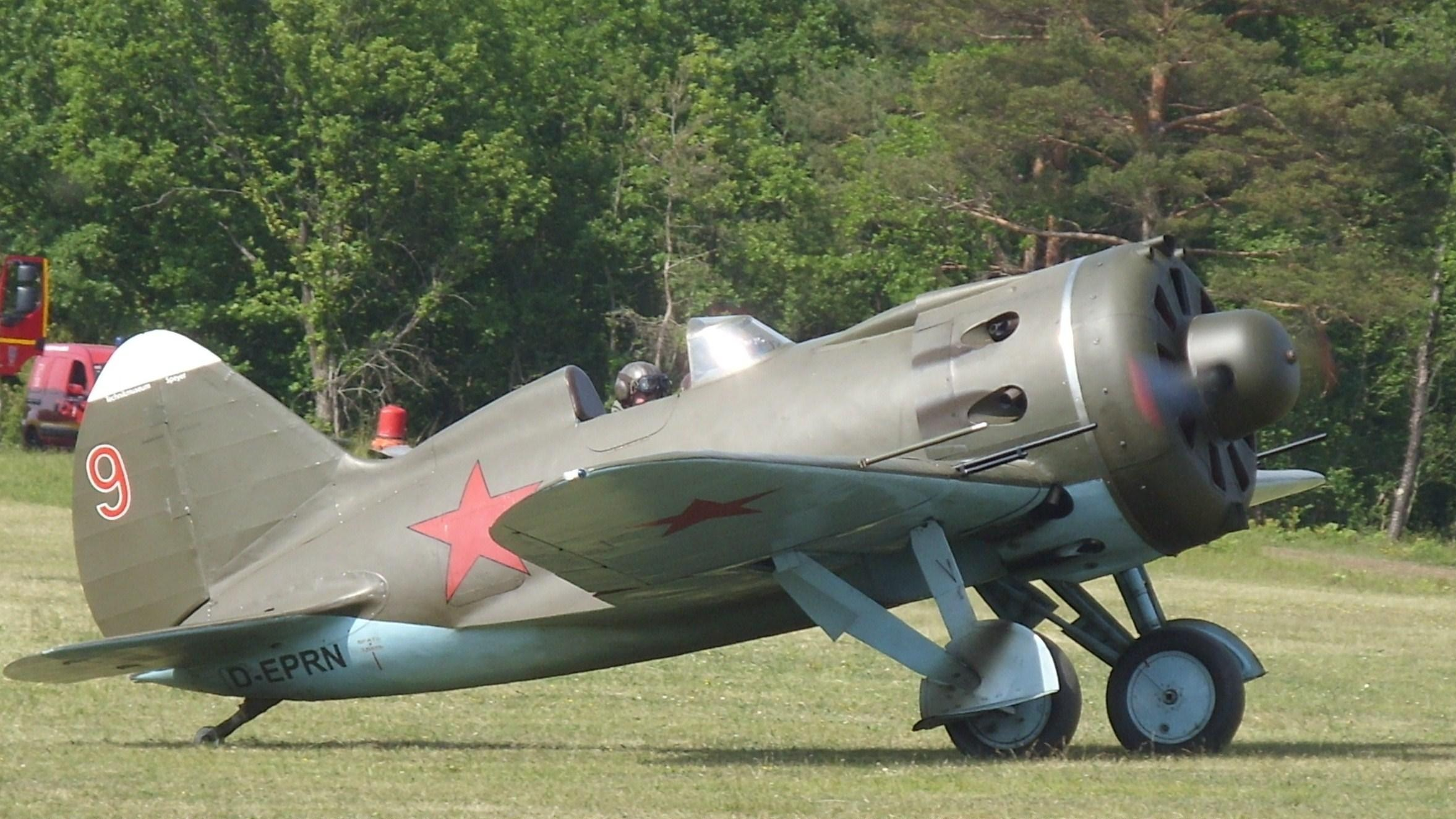 Ferté-Alais 2010